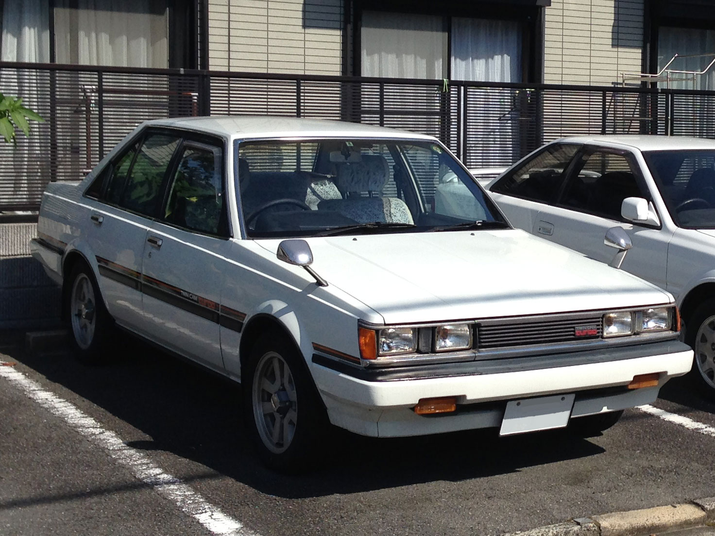 カリーナGT-T